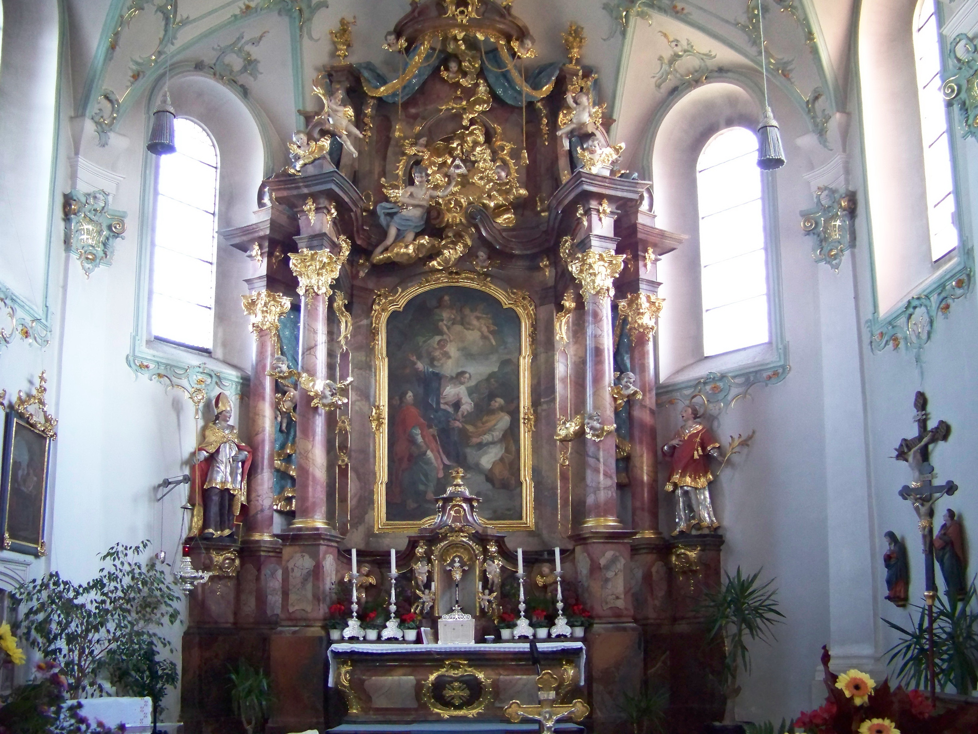 Geiselhöring, Schlossgraben 17. Katholische Stadtpfarrkirche St. Petrus und Erasmus. Barockes Langhaus, 1761-64 von Georg Fischer, Chor und Turmuntergeschosse mittelalterlich, Obergeschoss 1776; mit Ausstattung. Hochaltar aus dem Jahr 1721.